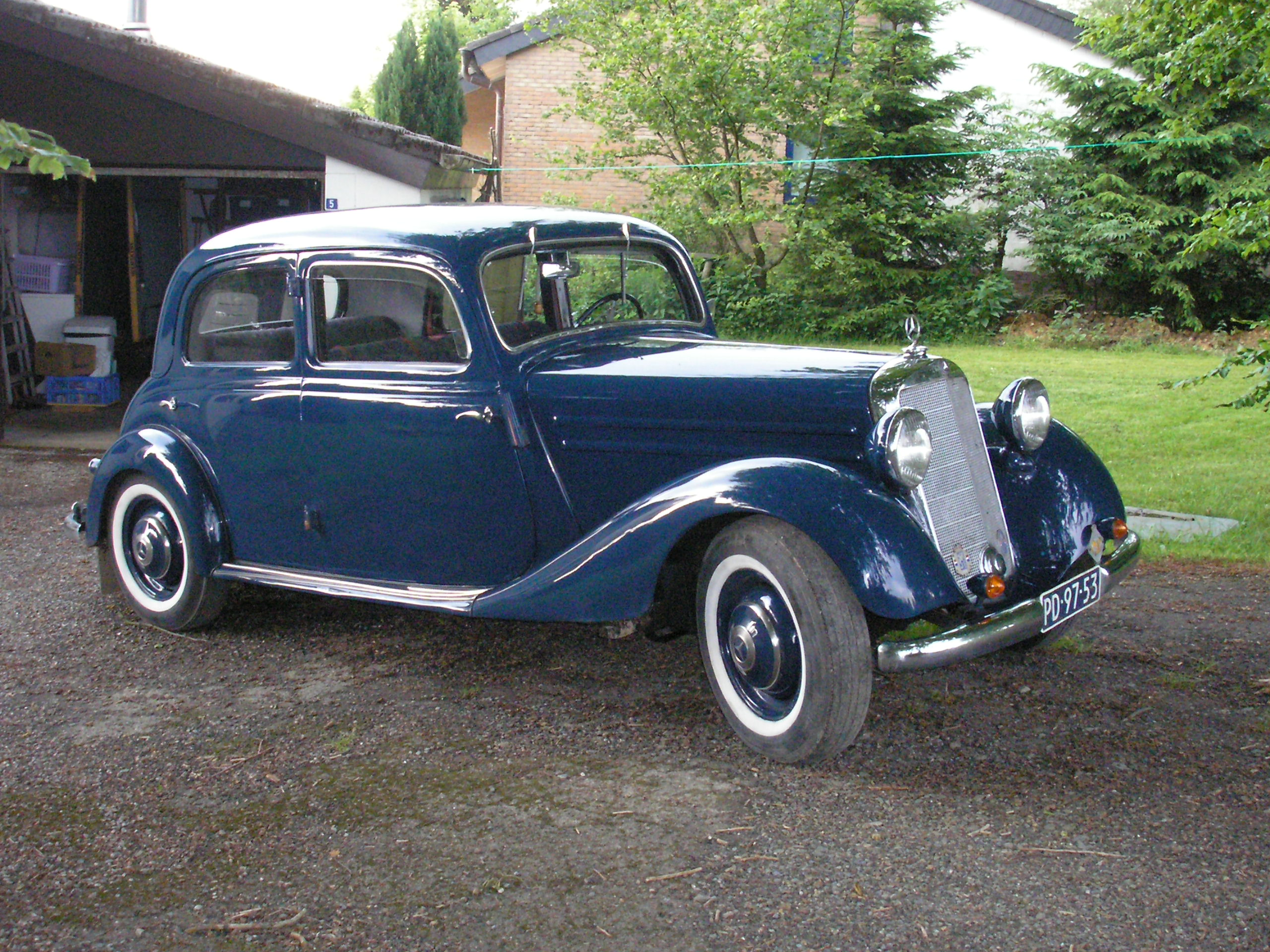 Ein alter Mercedes-Benz am Fuß des Hohen Venns.